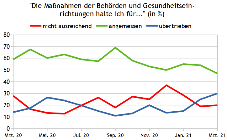 Corona-Maßnahmen, Bewertung der deutschen Bevölkrung